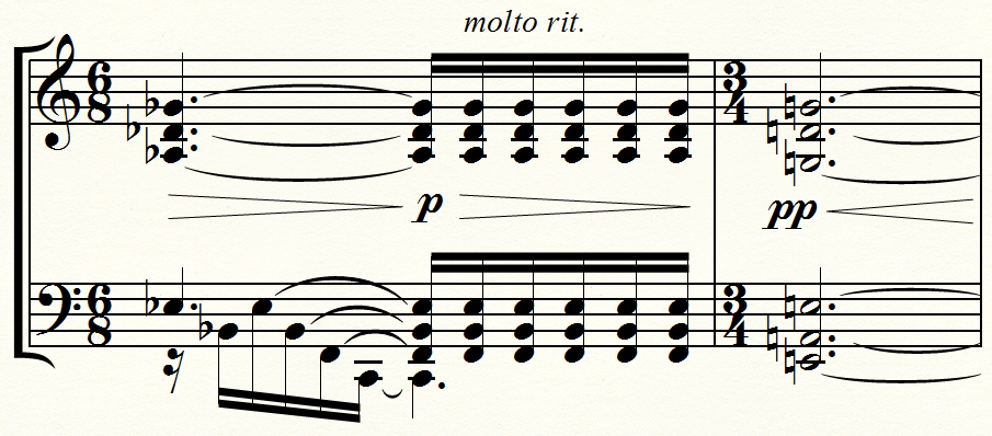 Quartenakkorde aus dem A. Bergs 'Wozzeck'